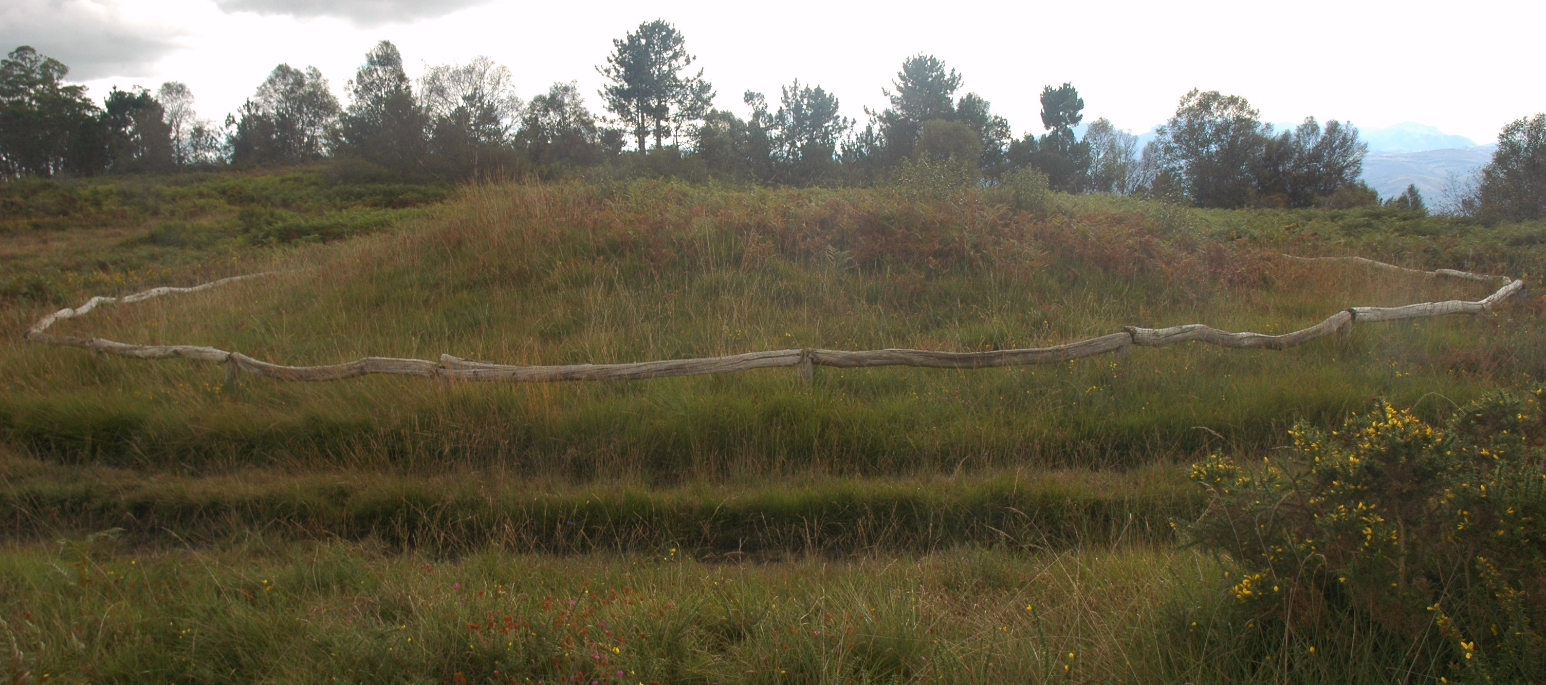 Semeya d'ún de los túmulos d'esa necrópolis.